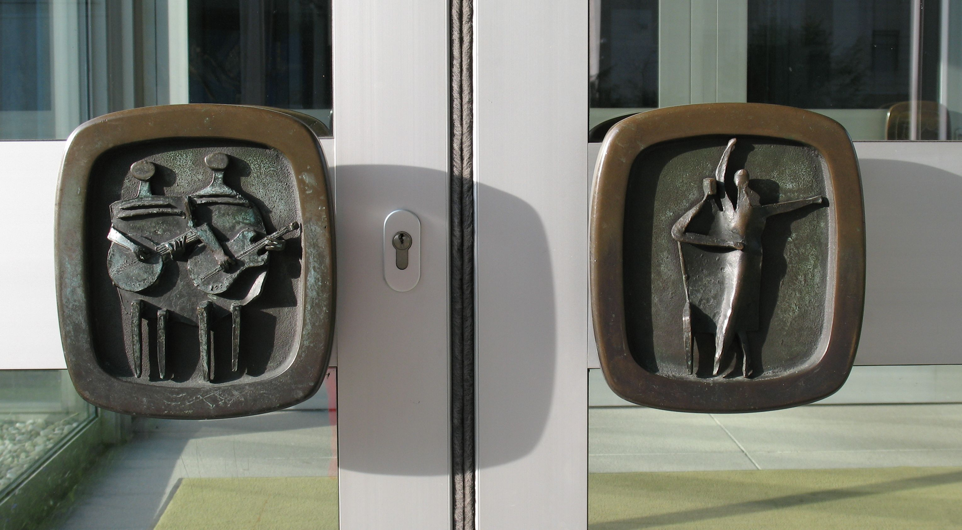 Theo Bechteler: Türgriffe an den Eingangstüren zum Hofgarten-Saal in Immenstadt